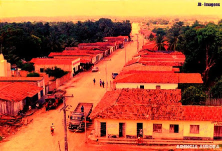 Imagem de Centro do Guilherme vista da torre da antiga Companhia Telefônica (TELMA) na Rua Principal. 1993